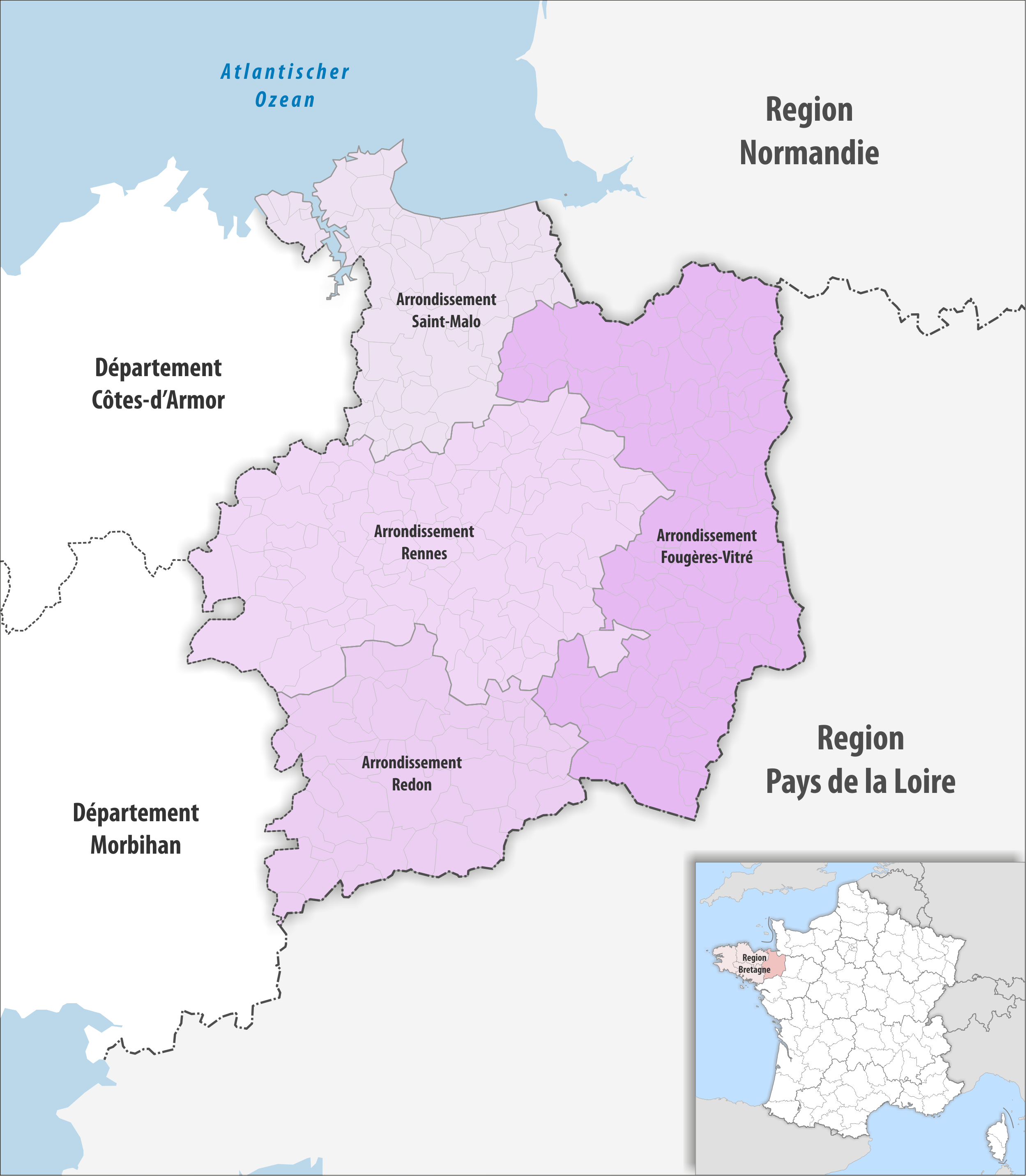 Gemeinden und Arrondissemente im Departement Ille-et-Vilaine